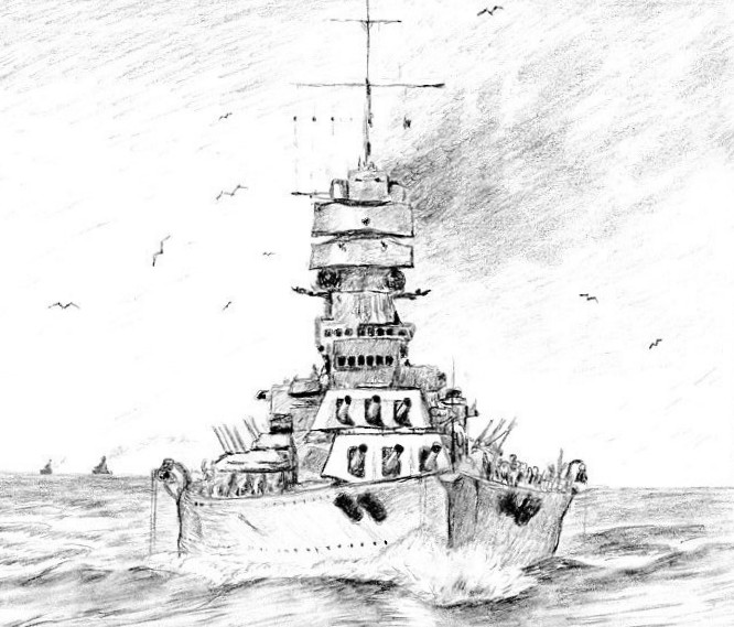 Линейный корабль "Витторио Венето", рисунок